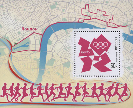 Почтовая марка России